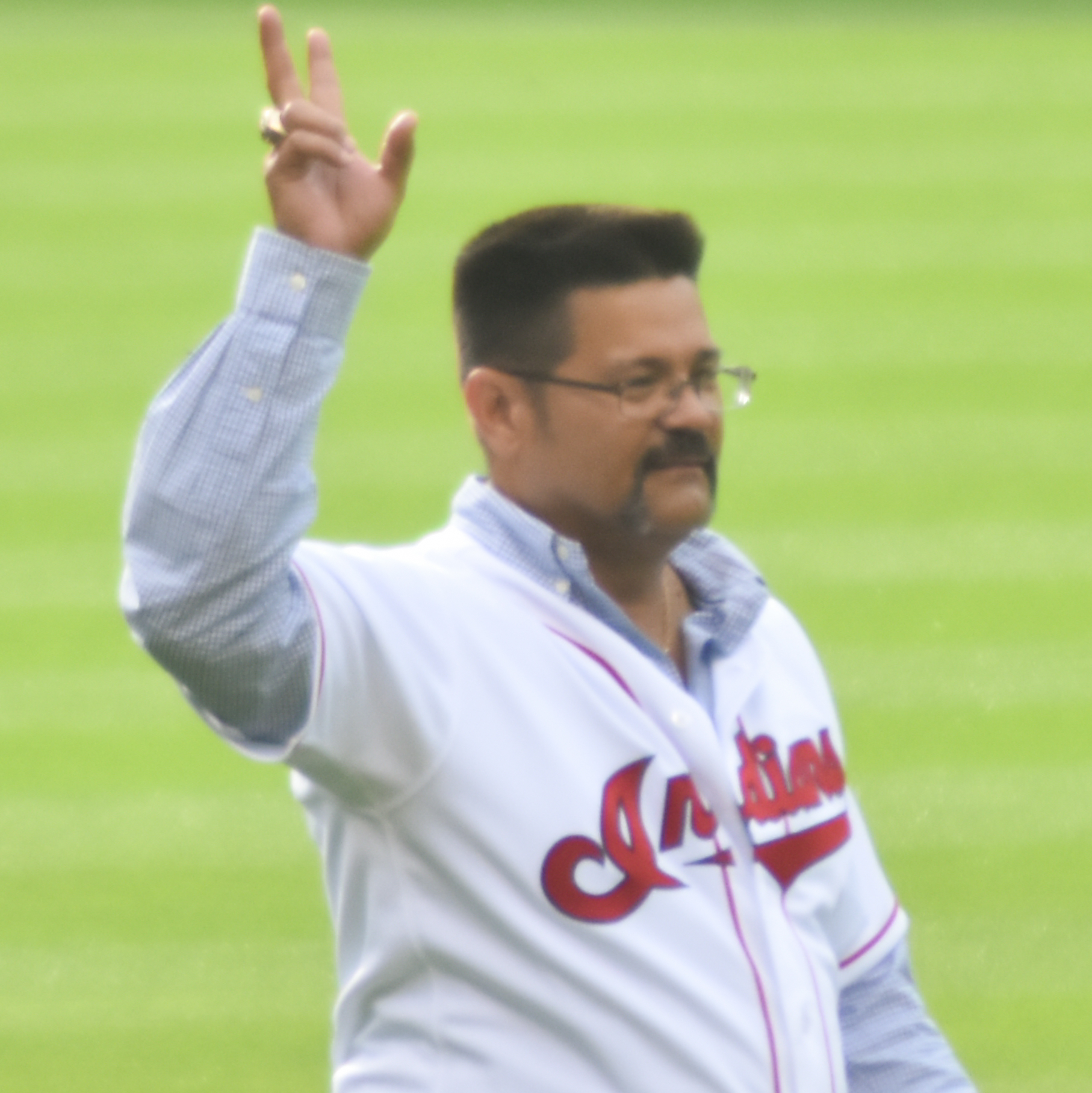 Alvaro Espinoza